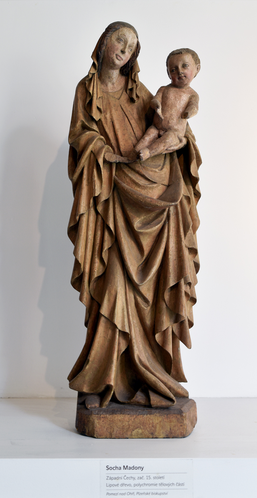 Madona z Pomezí nad Ohří, poč. 15. stol., Muzeum církevního umění plzeňské diecéze